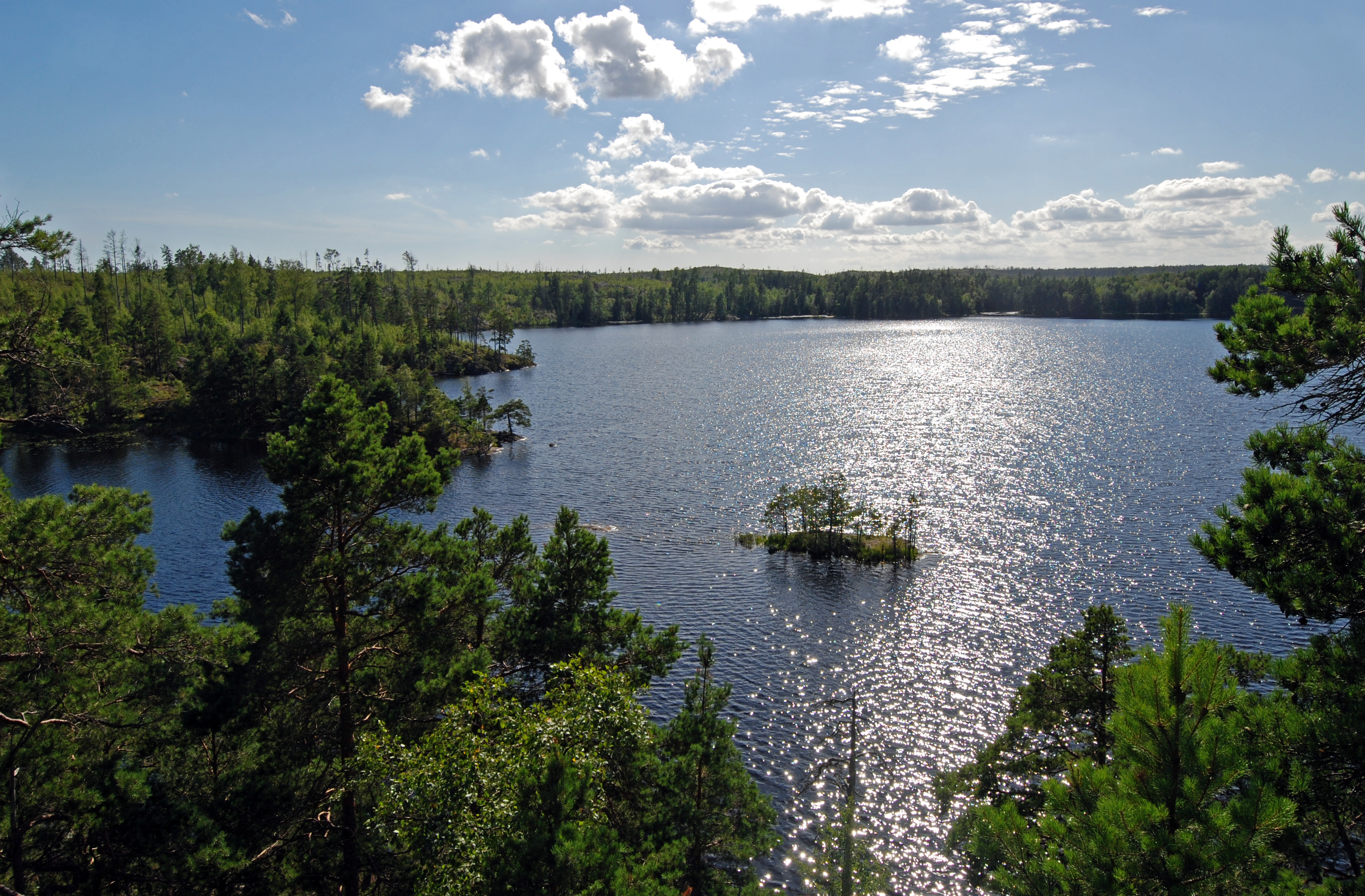 Stensjön, Tyresta